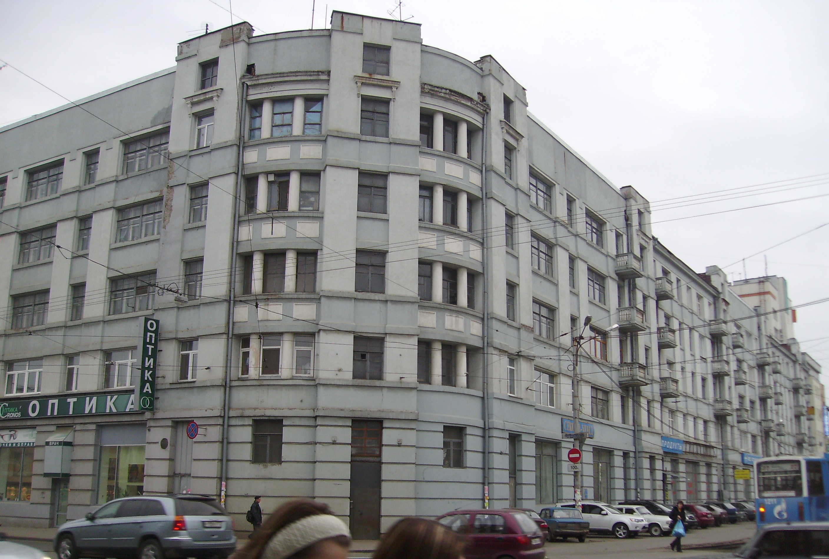 Жилой дом в стиле постмодерн архитектора Мичурина Е.М., 1935, Н.Новгород, ул. Советская 19/2